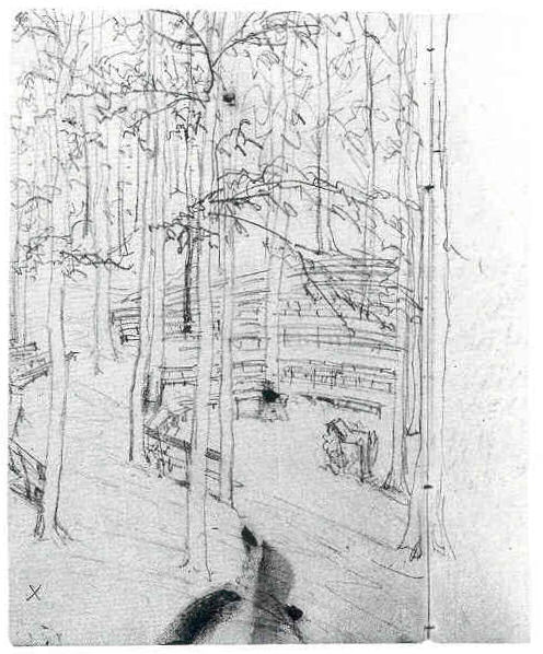 Die Buchenhalle bei Kösen. Bleistift. Berlin, Kupferstichkabinett (Skizzenbuch 27, S. 66)